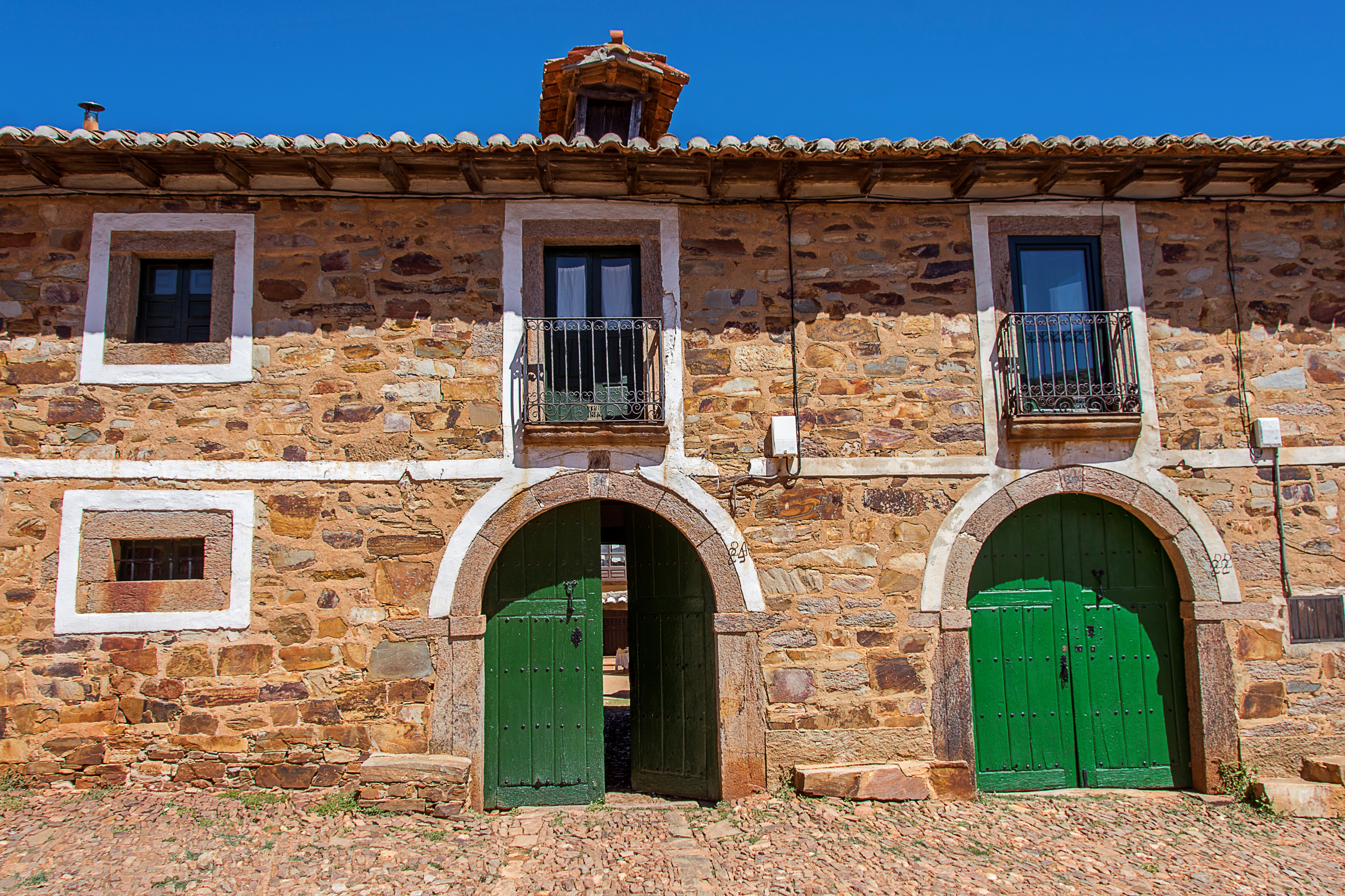 Casa típica en Castrillo de los Polvazares, en la comarca de la Maragatería (provincia de León)